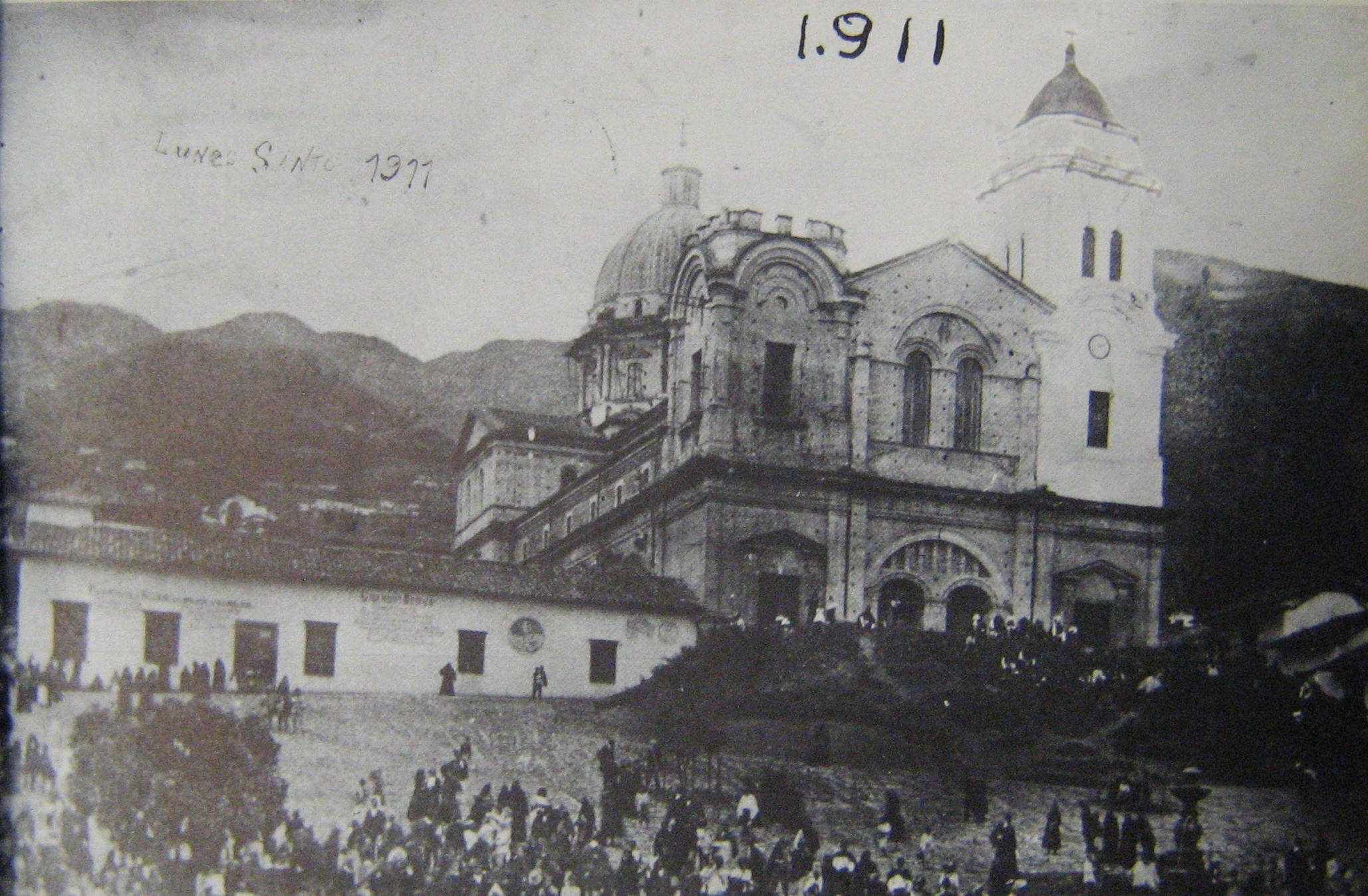 Basílica Menor de Nuestra Señora de la Merced de Yarumal en construcción, 1911, Antioquia, Colombia.